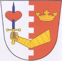 znak obce Škvořetice